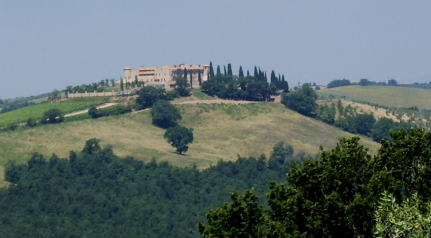 Panorama e veduta del prospetto meridionale del Castello di Colle Massari (GR)